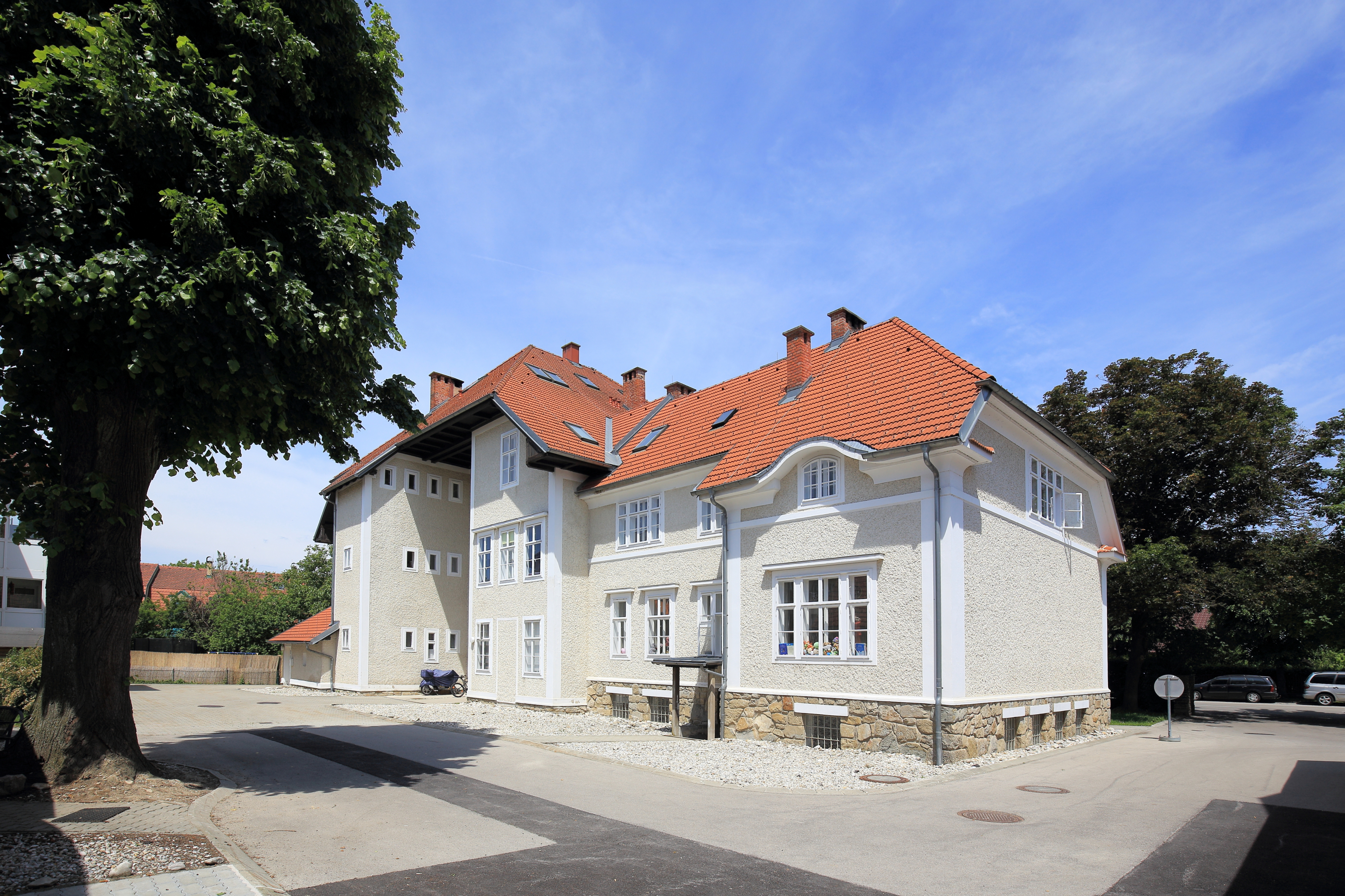 Die ehemalige landwirtschaftliche Fachschule (Dr.-Carl-Kupelwieser-Straße 20) in Heuberg, ein Ortsteil der niederösterreichischen Marktgemeinde Pyhra. Ein Komplex aus 2 unregelmäßig gestalteten zwei bis dreigeschossigen Gebäuden unter Walmdach und mit Rieselputzfassade sowie Natursteinsockel. Gestiftet vom Gutsherrn zu Kirnberg Karl Kupelwieser und 1913 errichtet.